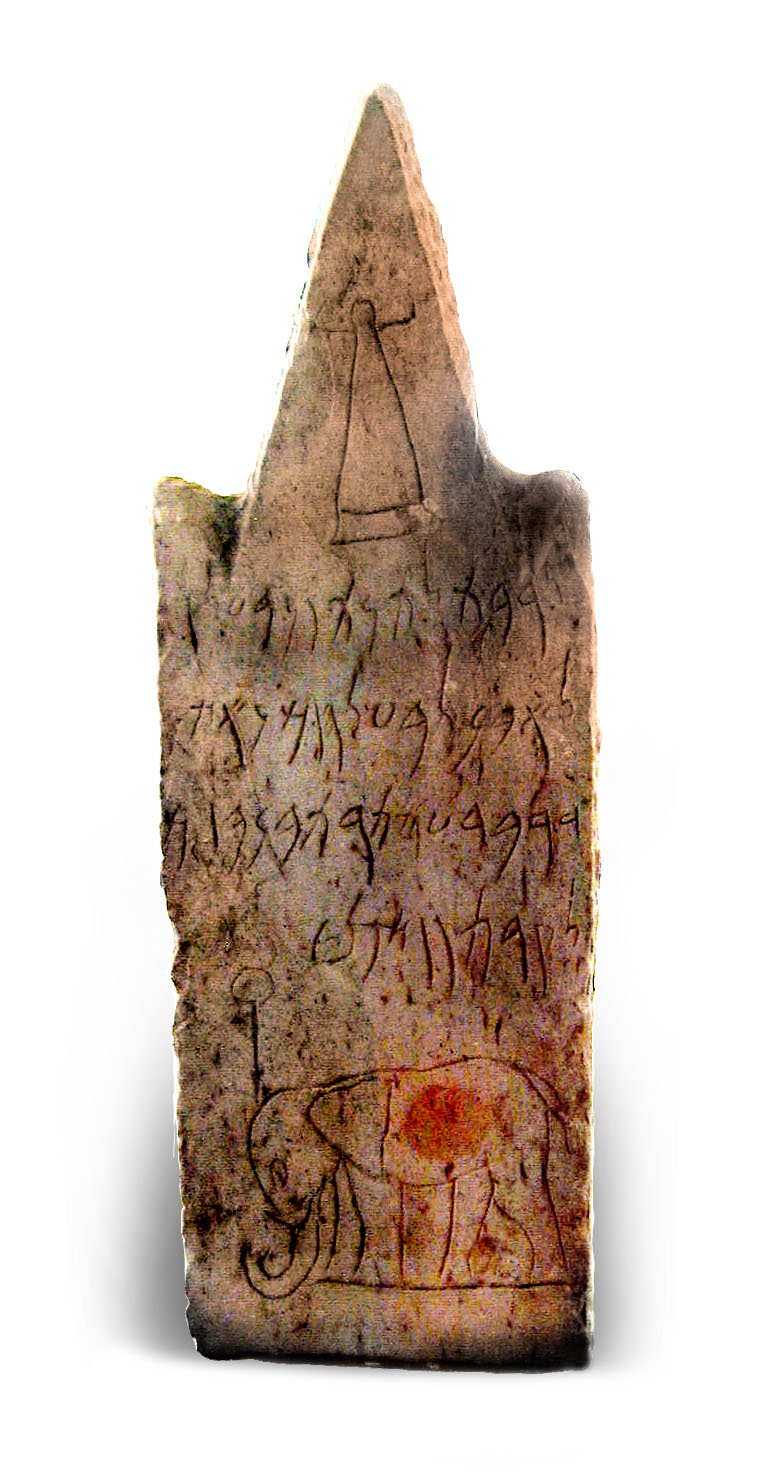 Clean version of Stèle éléphant musée carthage.jpg by Pradigue